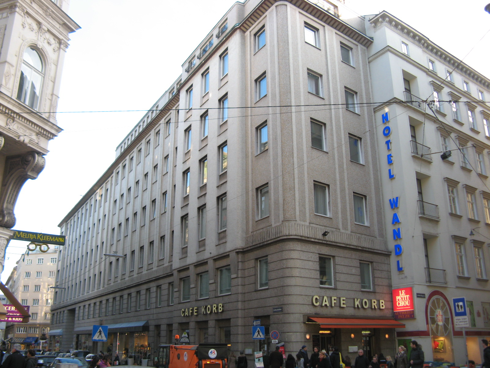 Haus Brandstätte 7-9 (1958-62) von Wiser, Pfaffenbichler und Bamer, Wien-Innere Stadt